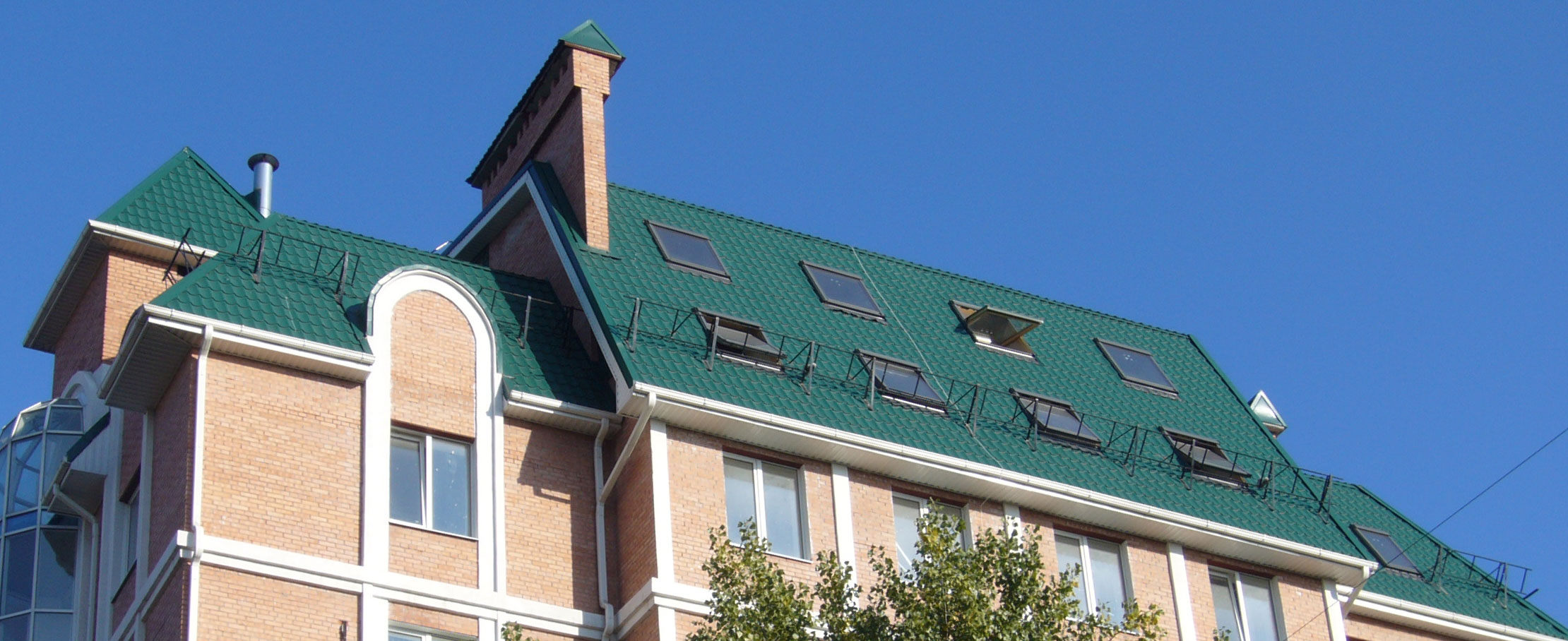 Снегодержатель на крыше здания